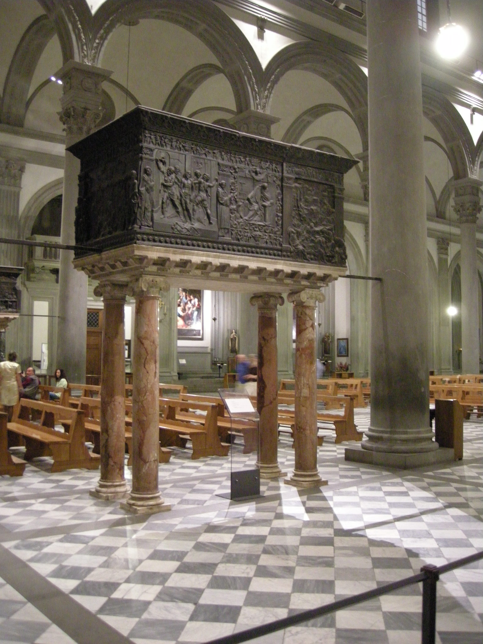 Donatello, pulpito della passione